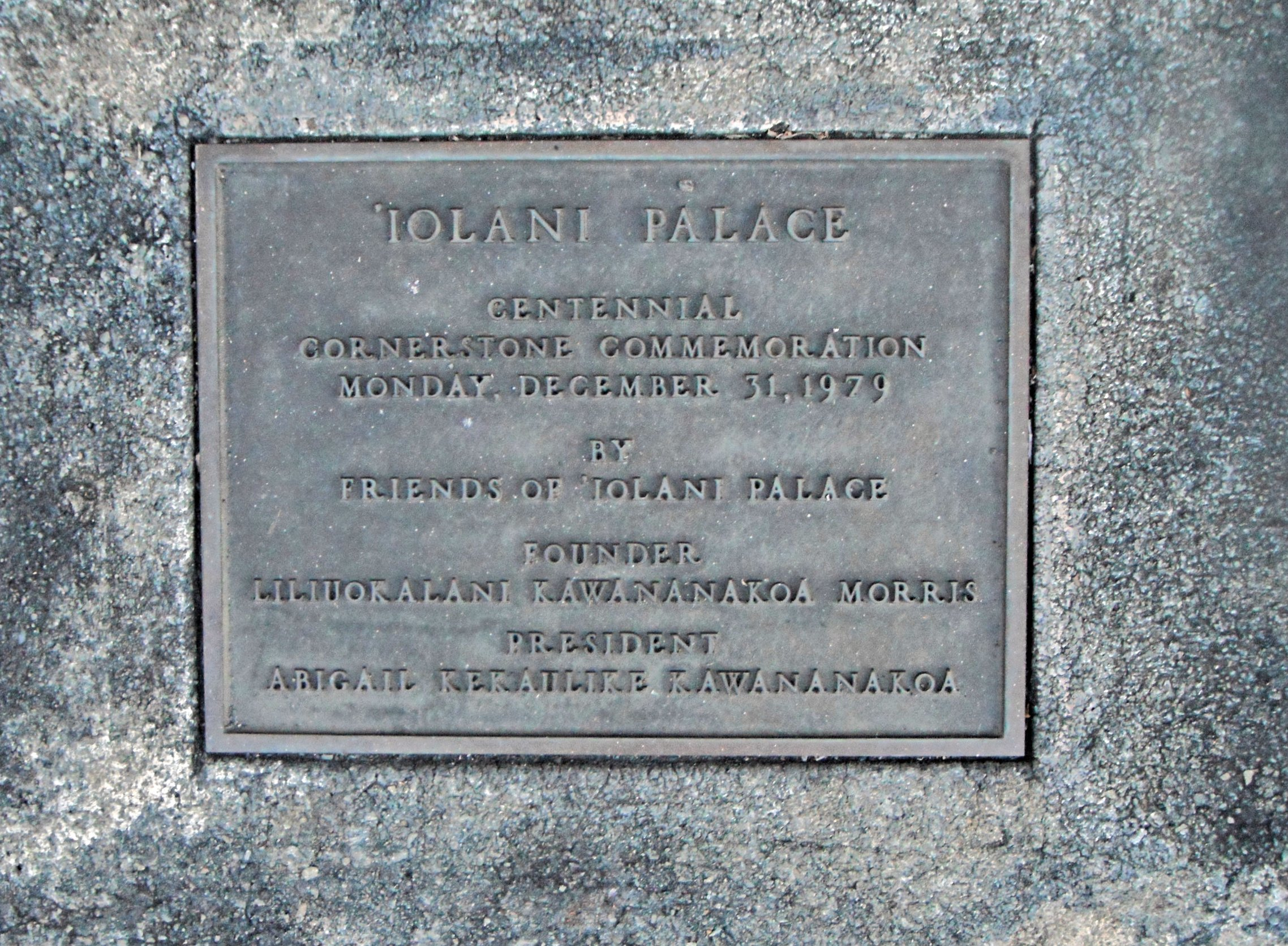 Iolani Palace centennial cornerstone